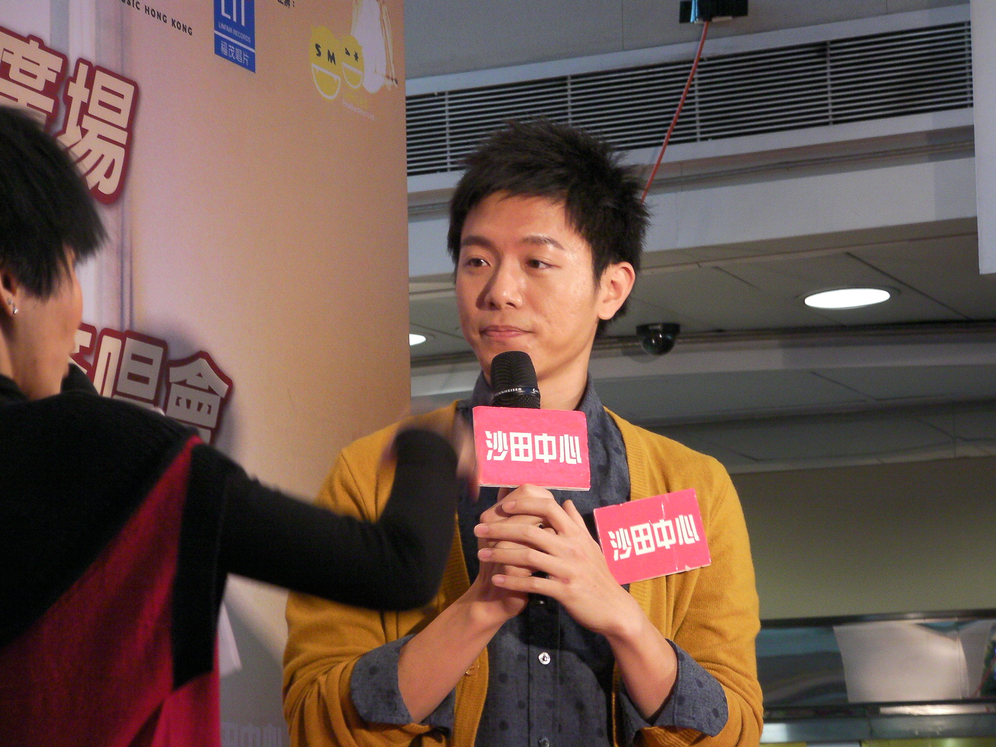 韋禮安在沙田中心舉辦第二張創作專輯《有人在等》香港簽唱會